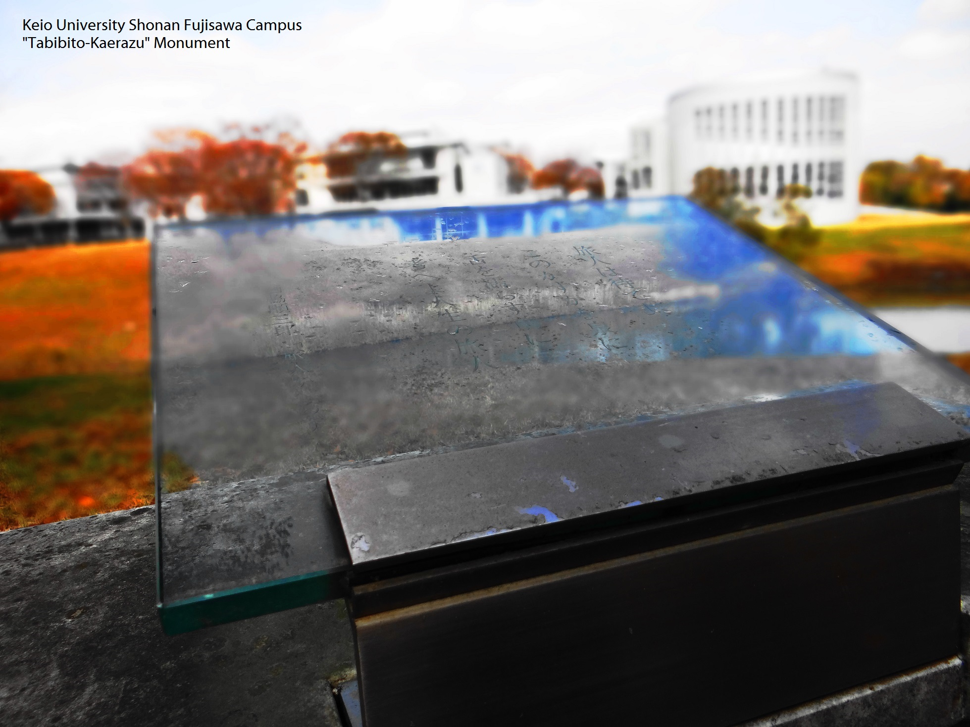 Keio University SFC Tabibito-Kaerazu Monument